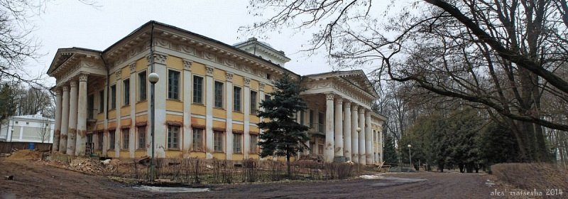 Сядзібны комплекс Булгакаў "Добасна"